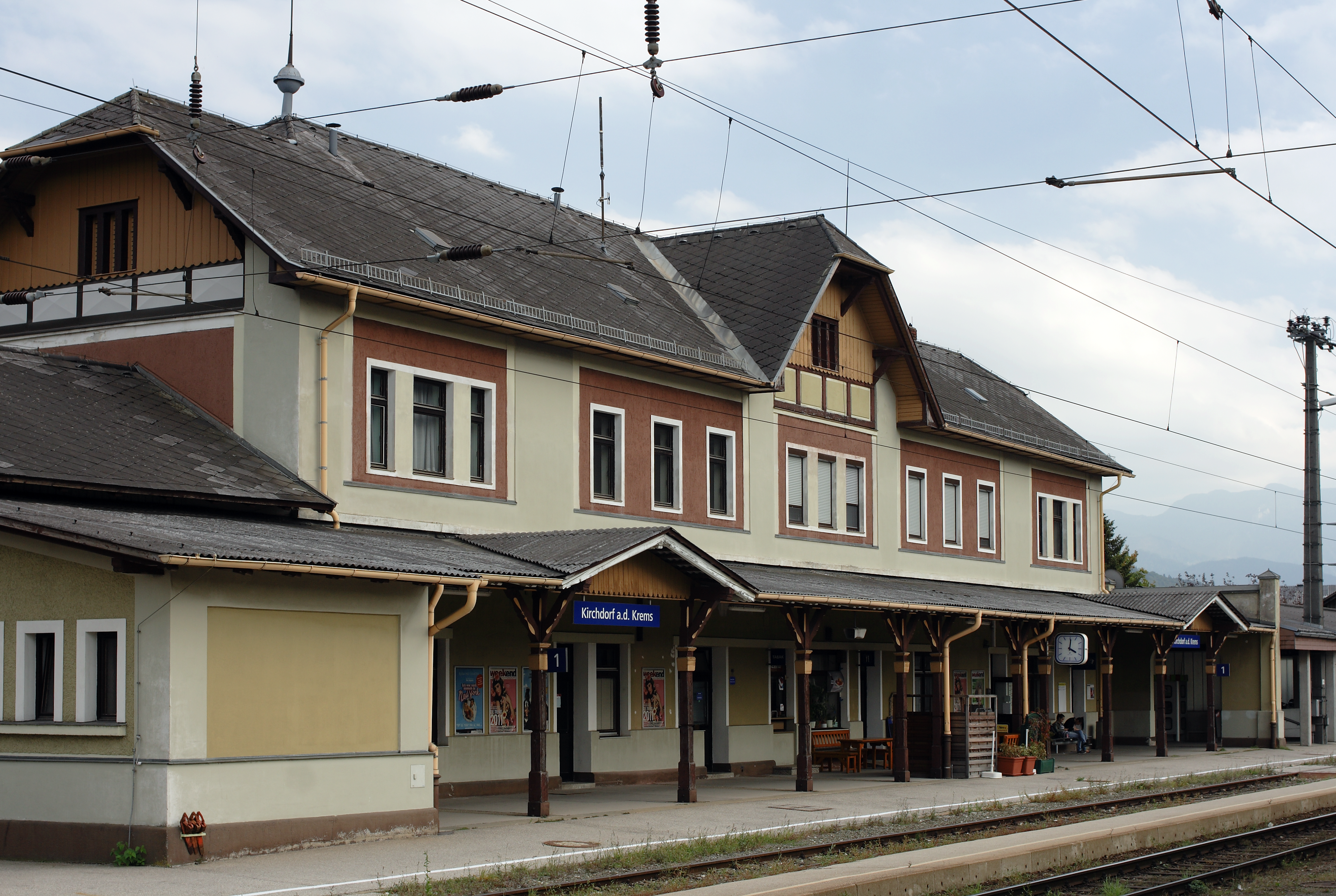 Der Bahnhof in Kirchdorf an der Krems